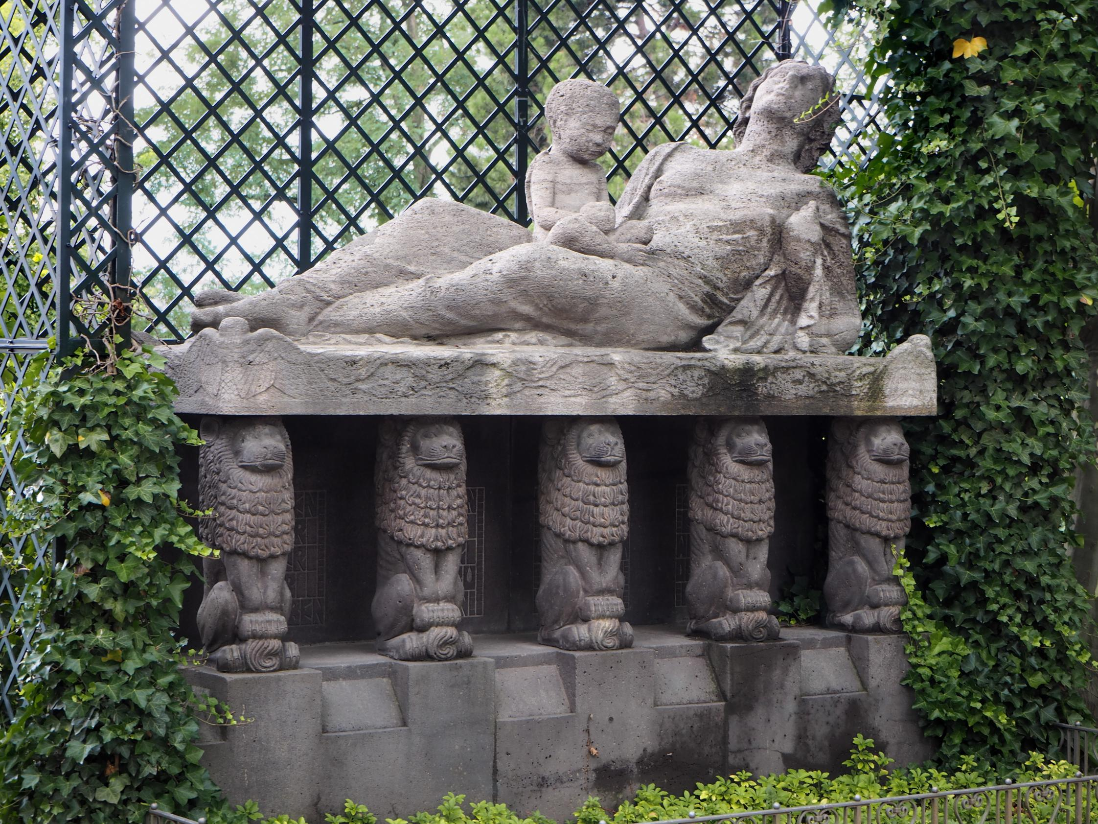 Darmstadt, Mathildenhöhe, Hoetger: Werden und Vergehen (1912-1914), Foto: Juli 2017